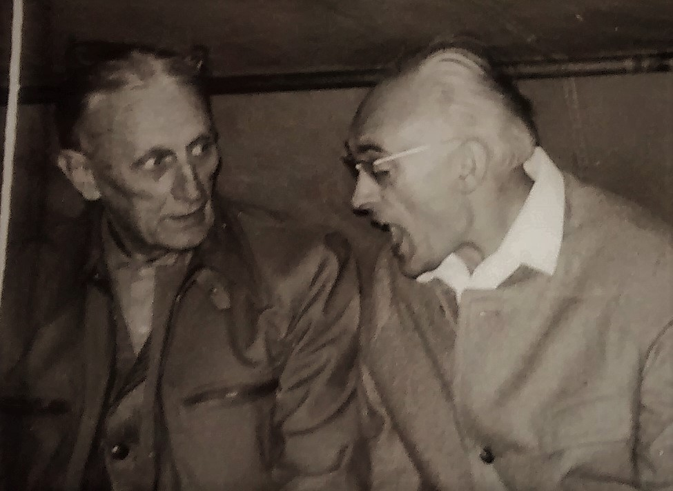 Das Foto zeigt die beiden ostfriesischen Künstler Hans Trimborn (links) und Bernhard Grotzeck (rechts) im Gespräch. Es entstand um 1970 anlässlich eines freiwirtschaftlichen Gartenfestes in Norden-Süderneuland (Niedersachsen, Deutschland). Wikipedia-Artikel zu Trimborn und Grotzeck: Hans Trimborn Bernhard Grotzeck